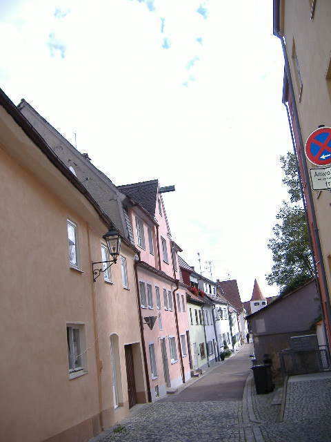 Altstadt Dillingen